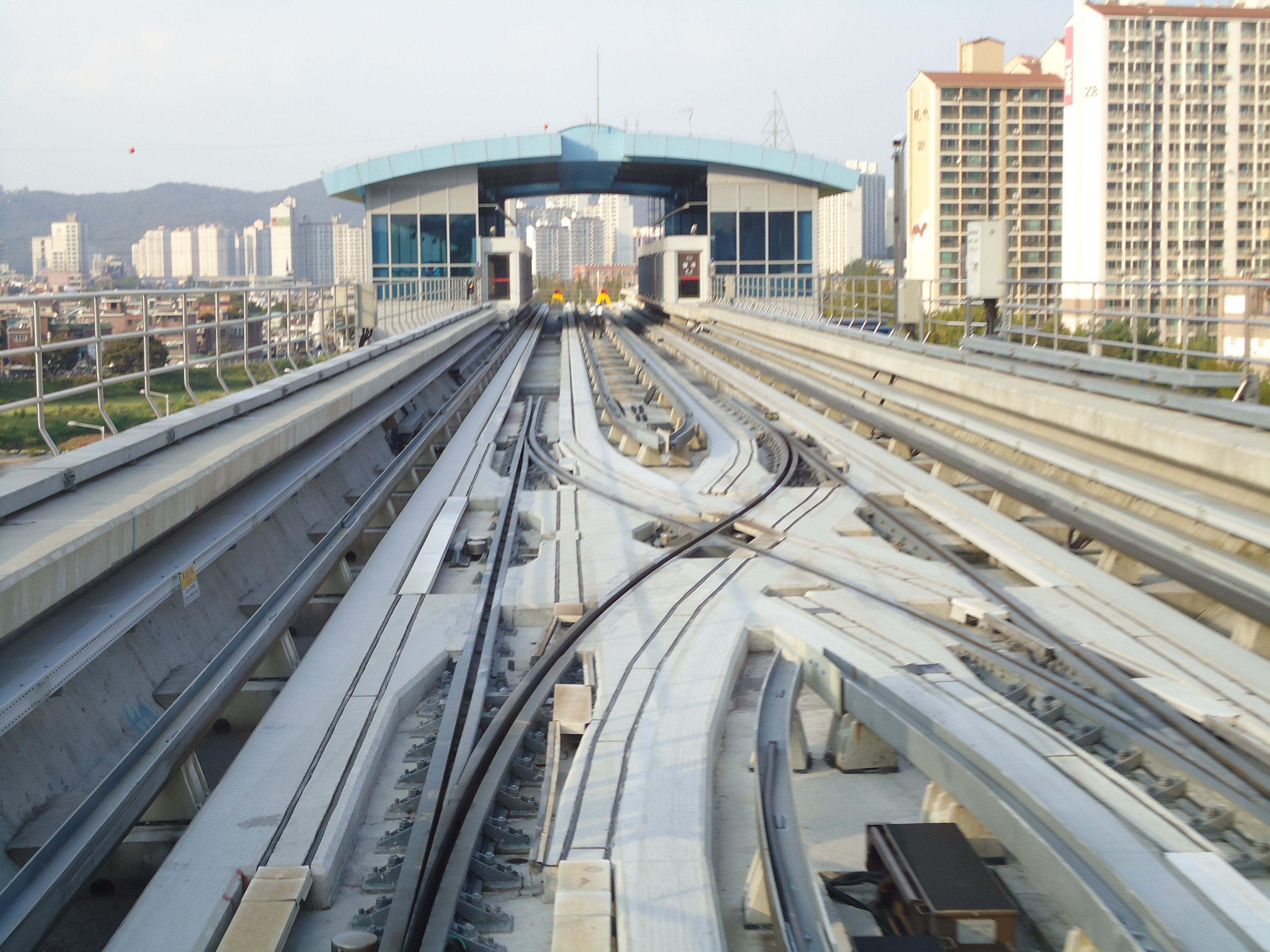 발곡역을 지나면 분기기를 지나 선로를 바꿔서 운행한다.